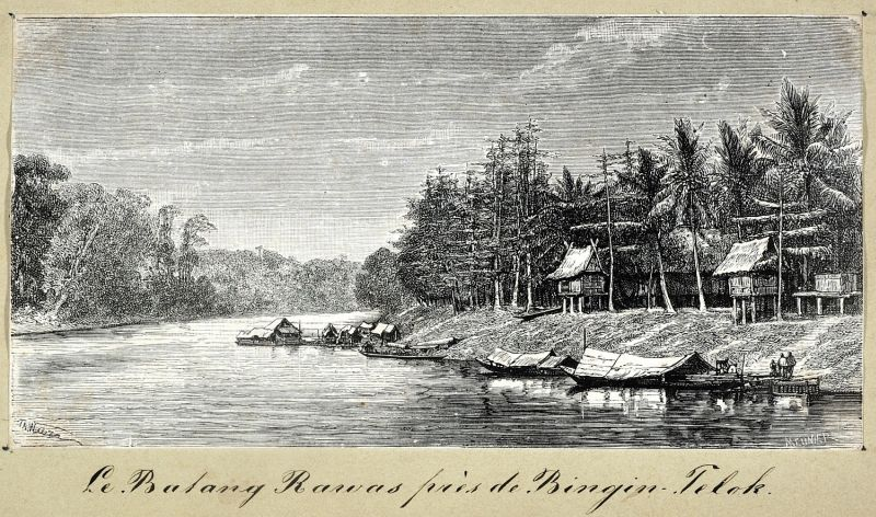 Gravure. Herk: Zuidoost Azie Indonesie Sumatra. De Batang Rawas bij Bingin-Telok